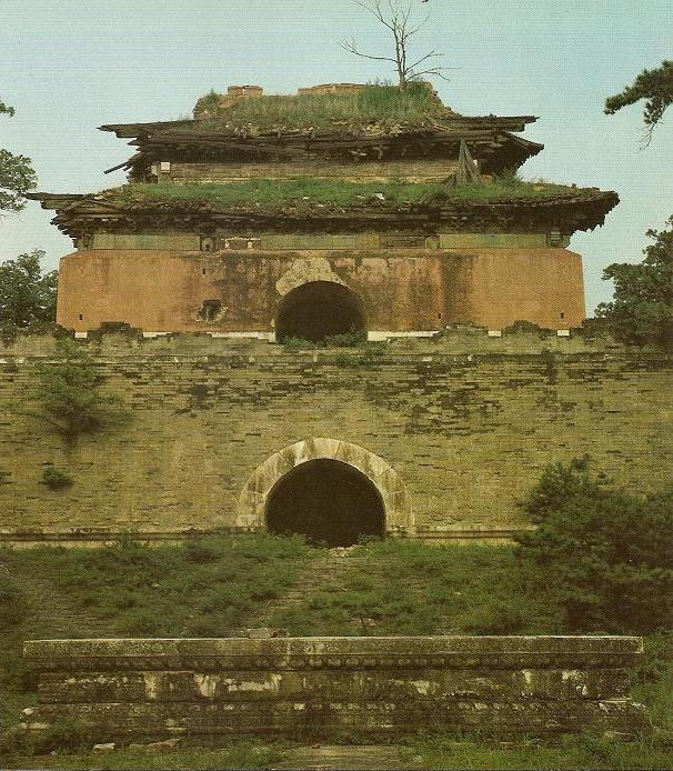 Grab des Ming-Kaisers Tianqi nahe Peking.